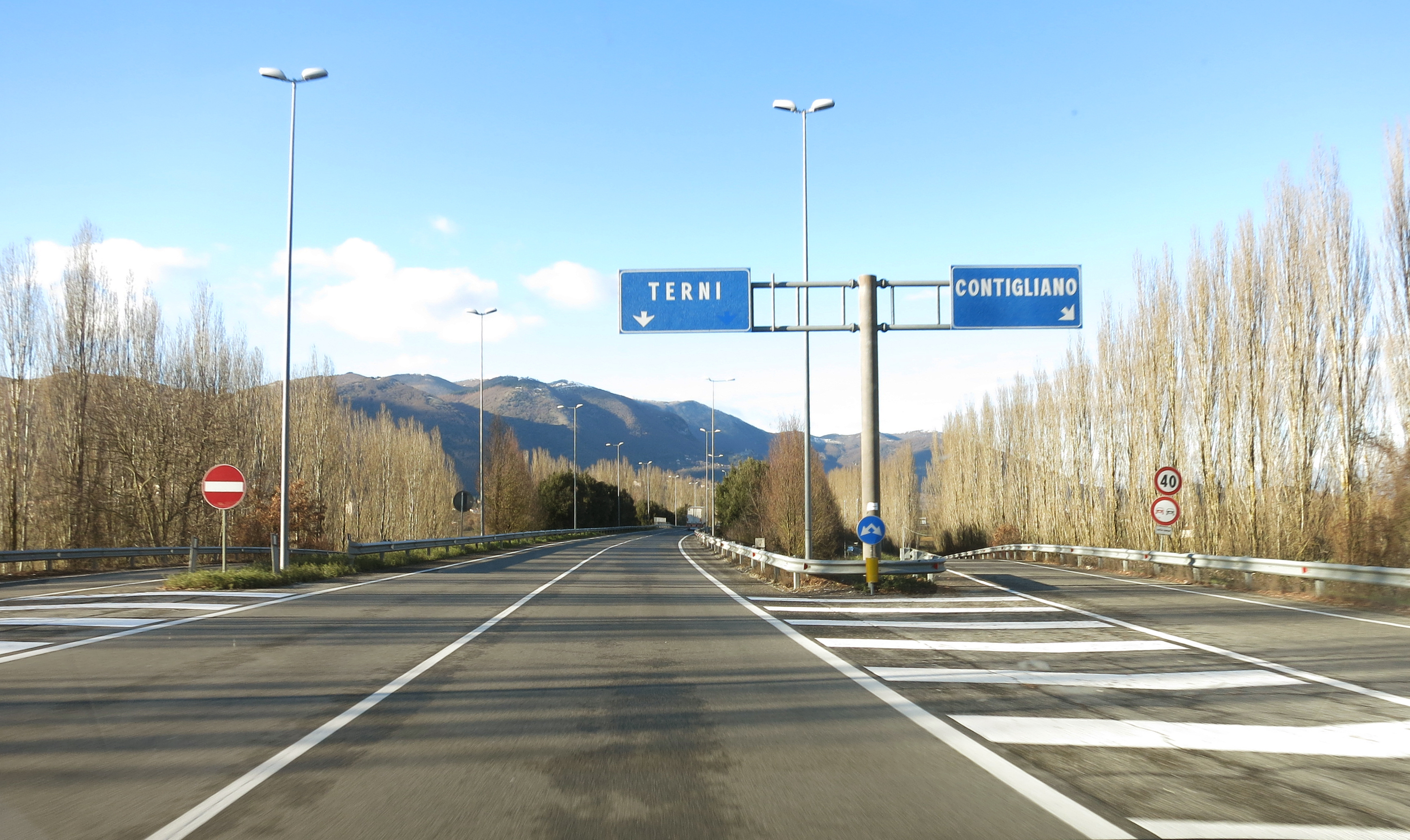 Svincolo di Contigliano posto sulla strada statale 79 Ternana (superstrada Rieti-Terni) fotografato in direzione Terni